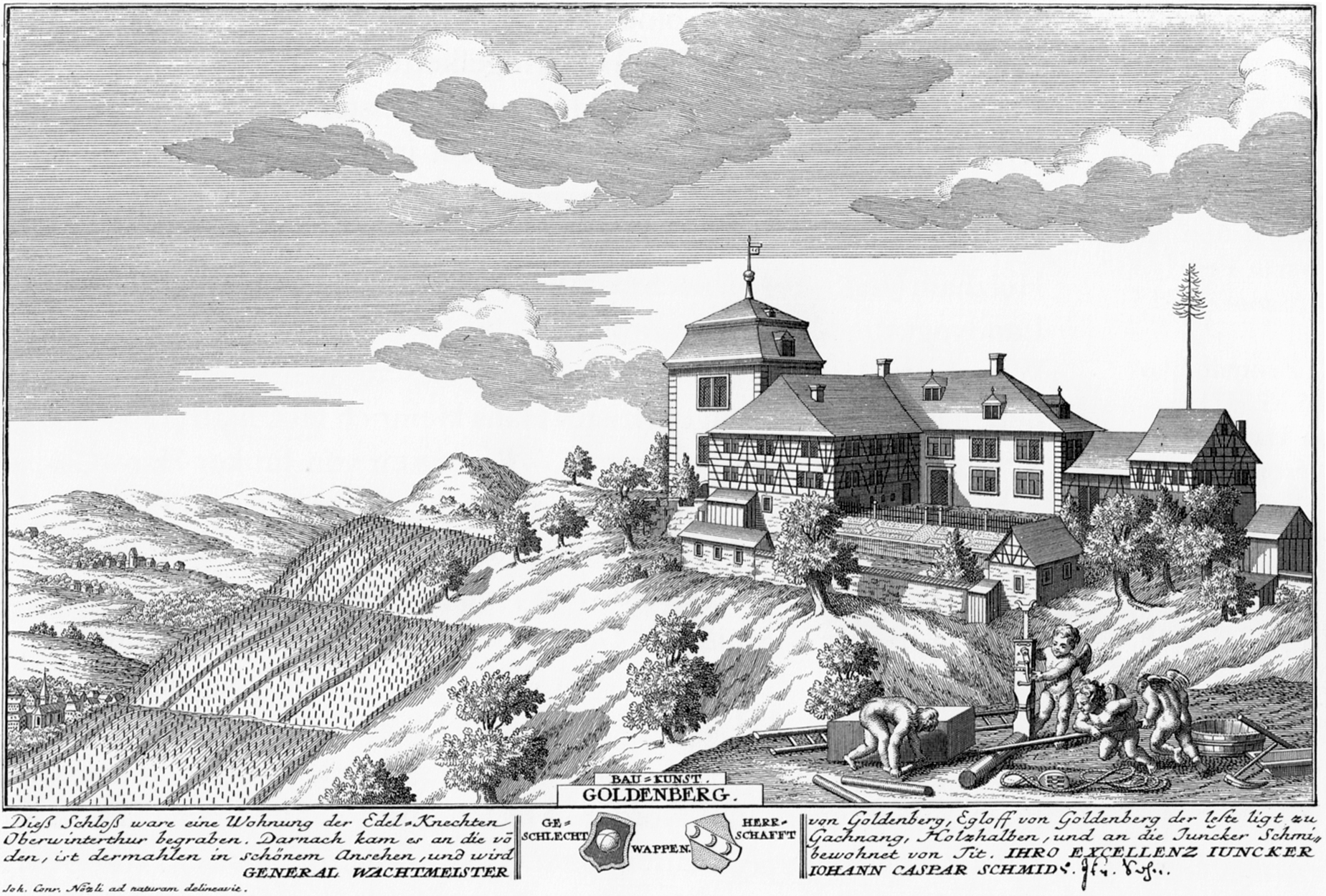 Schloss Goldenberg in der Gemeinde Dorf ZH im Jahr 1742. Erschienen in Herrlibergers Eigentliche Vorstellung der Adelichen Schlösser im Zürich Gebieth, Blatt 9, zweite Lieferung 1743 und in Topographie der Eydgnoßschaft, 5. Lieferung 1755.